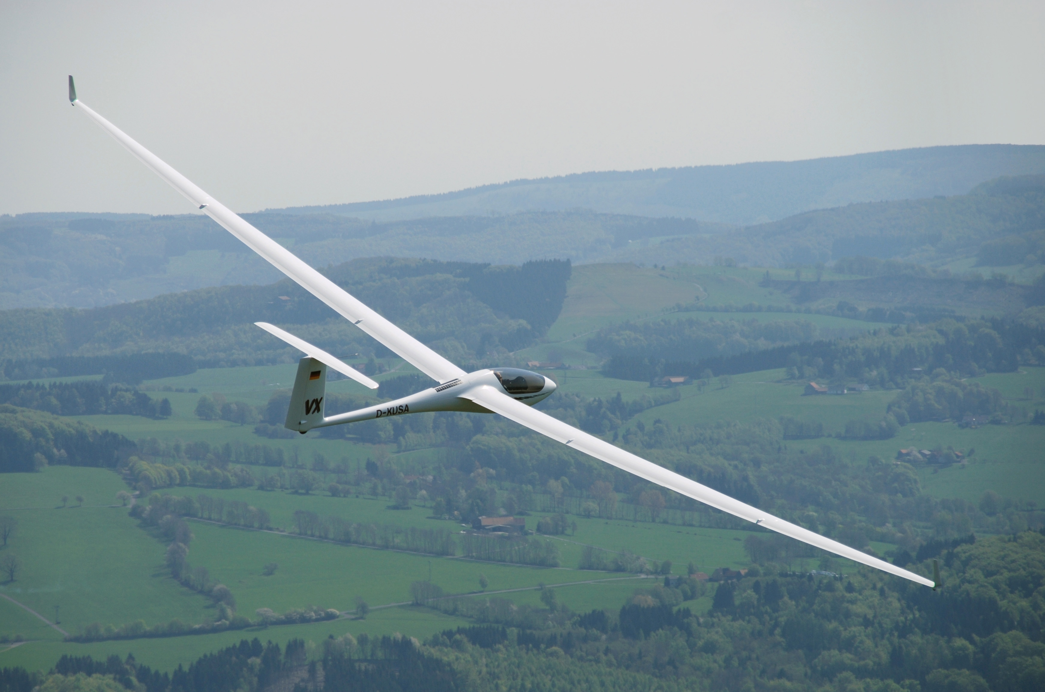 ASH 31 Mi Erstflug